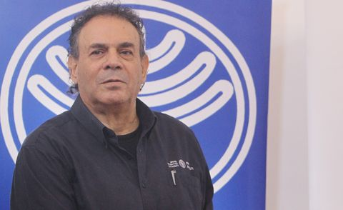 תמונתו של שוקה דורפמן מנהל רשות העתיקות